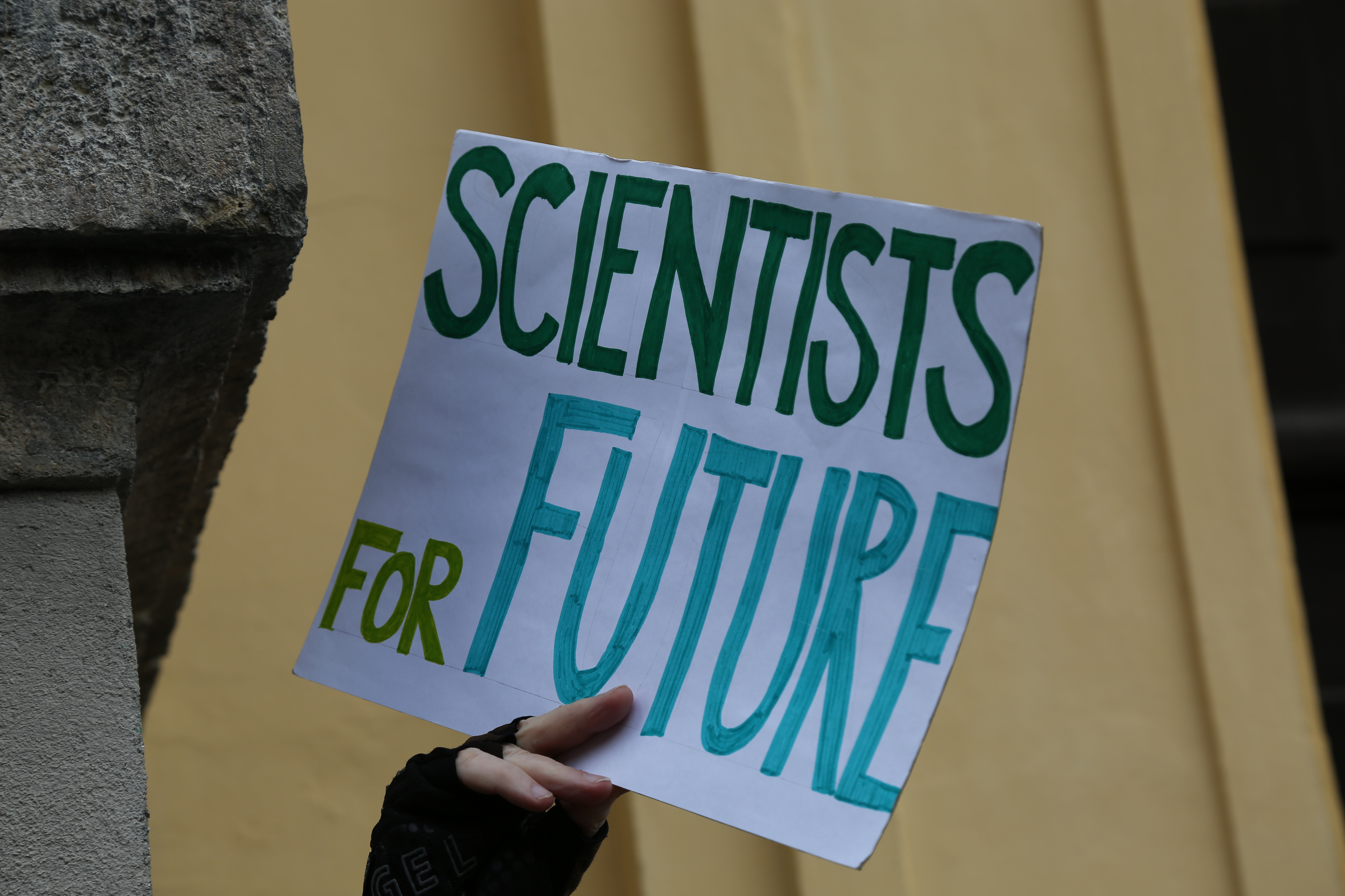 Munich for Future, gemeinsame Demonstration von Fridays for Future, Parents for Future und Scientists for Future, am 21. Juli 2019.